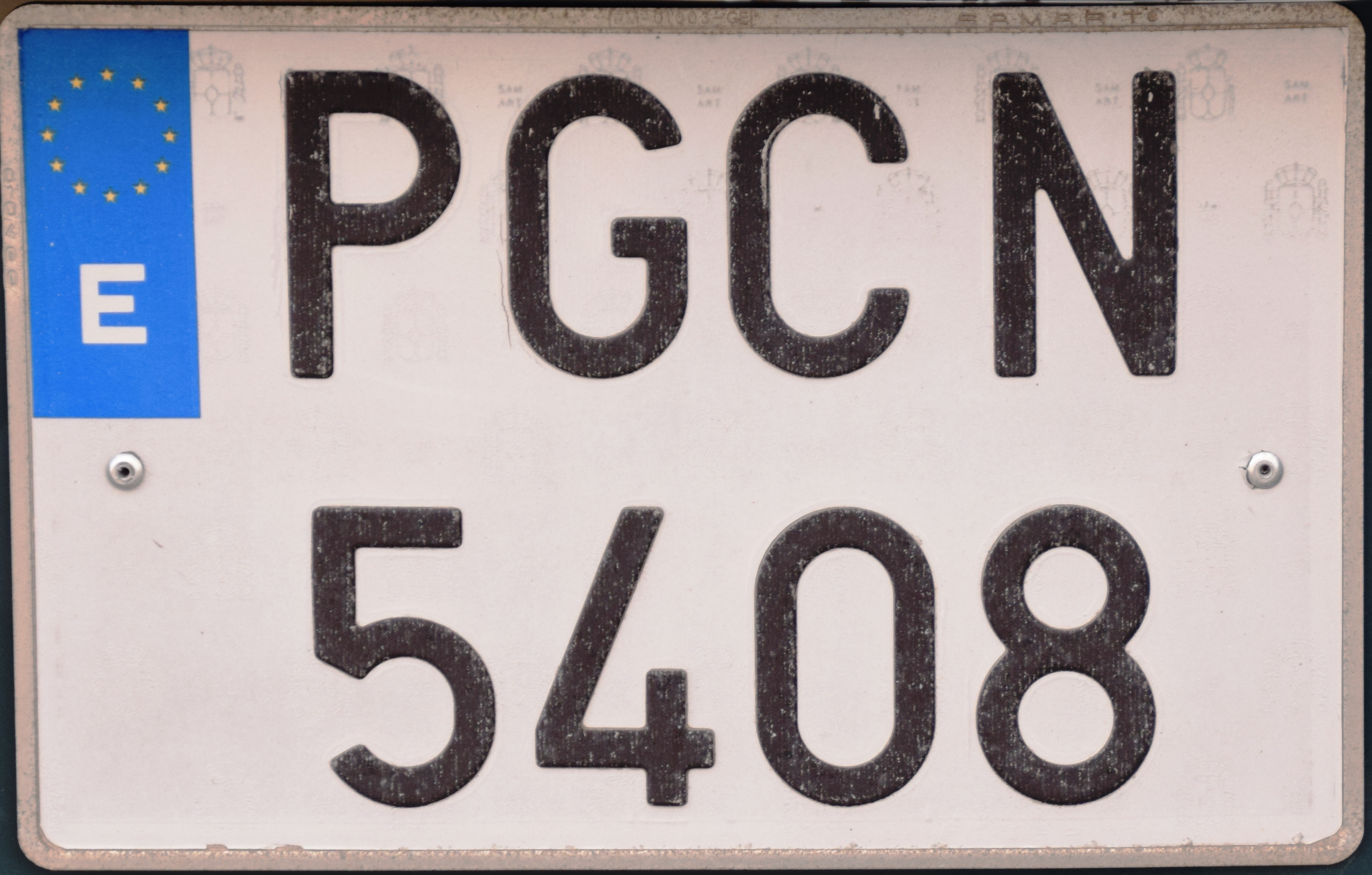 Guardia Civil kentekenplaat